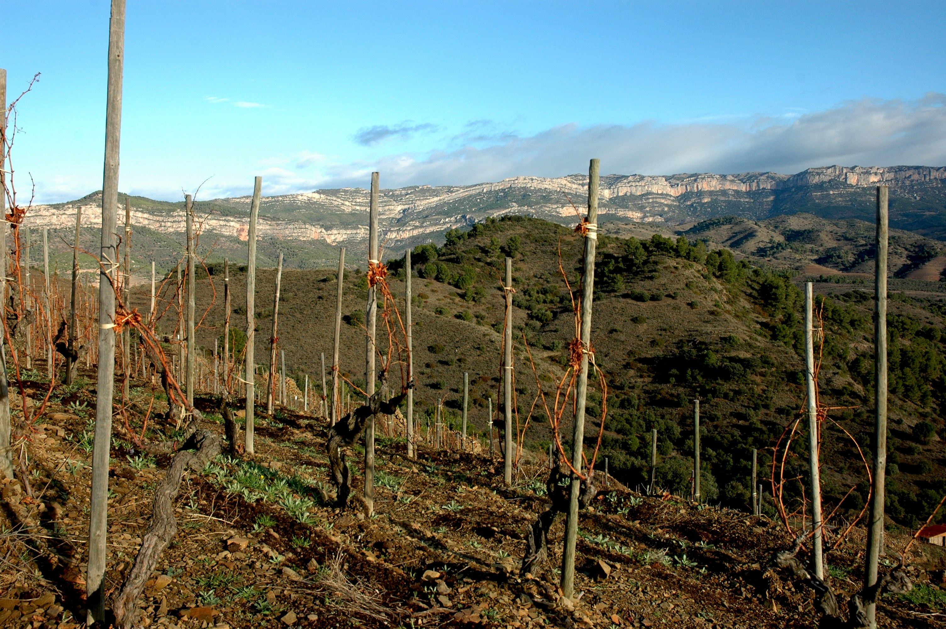 Gratallops - Vinya l'Ermita